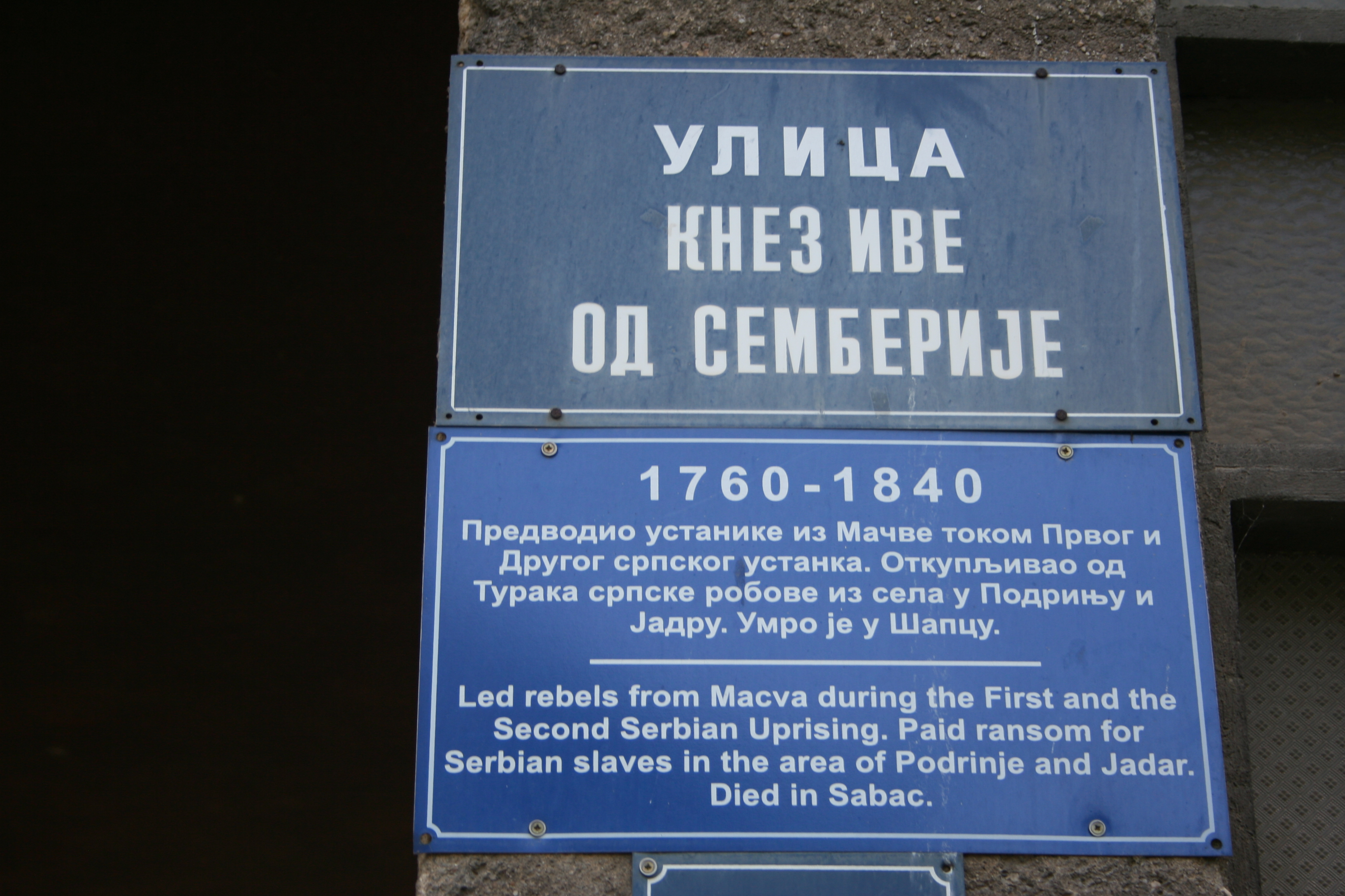 Ulica Kneza Ive od Semberije u Šapcu